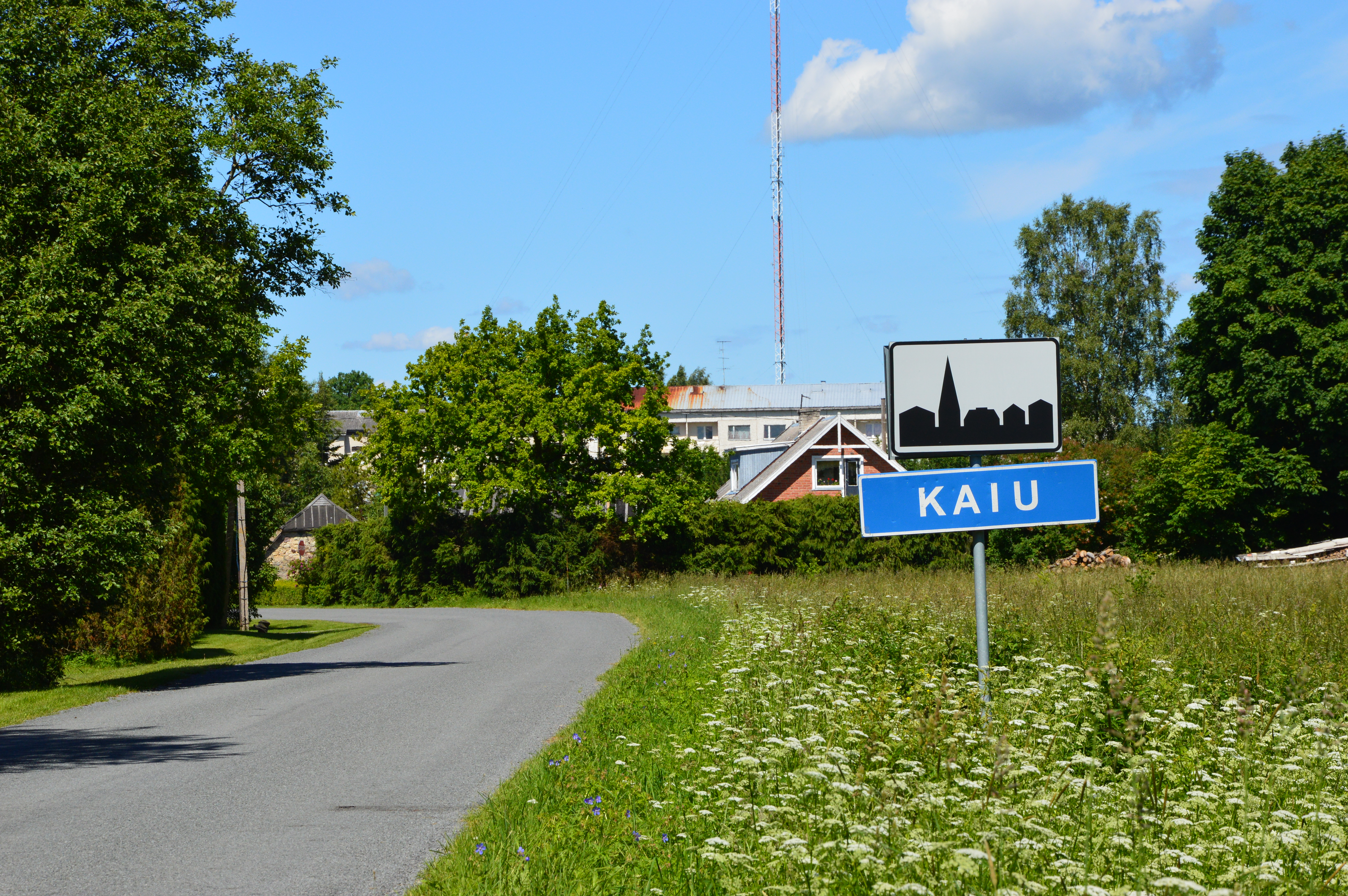 Kaiu alevik.